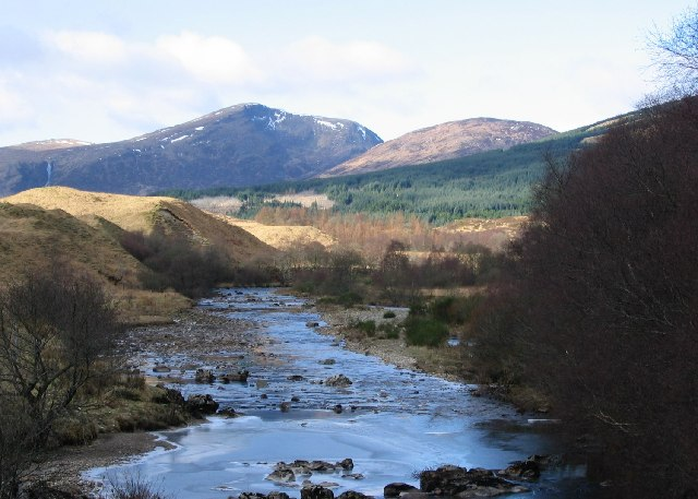 River Fillan at Dalrigh